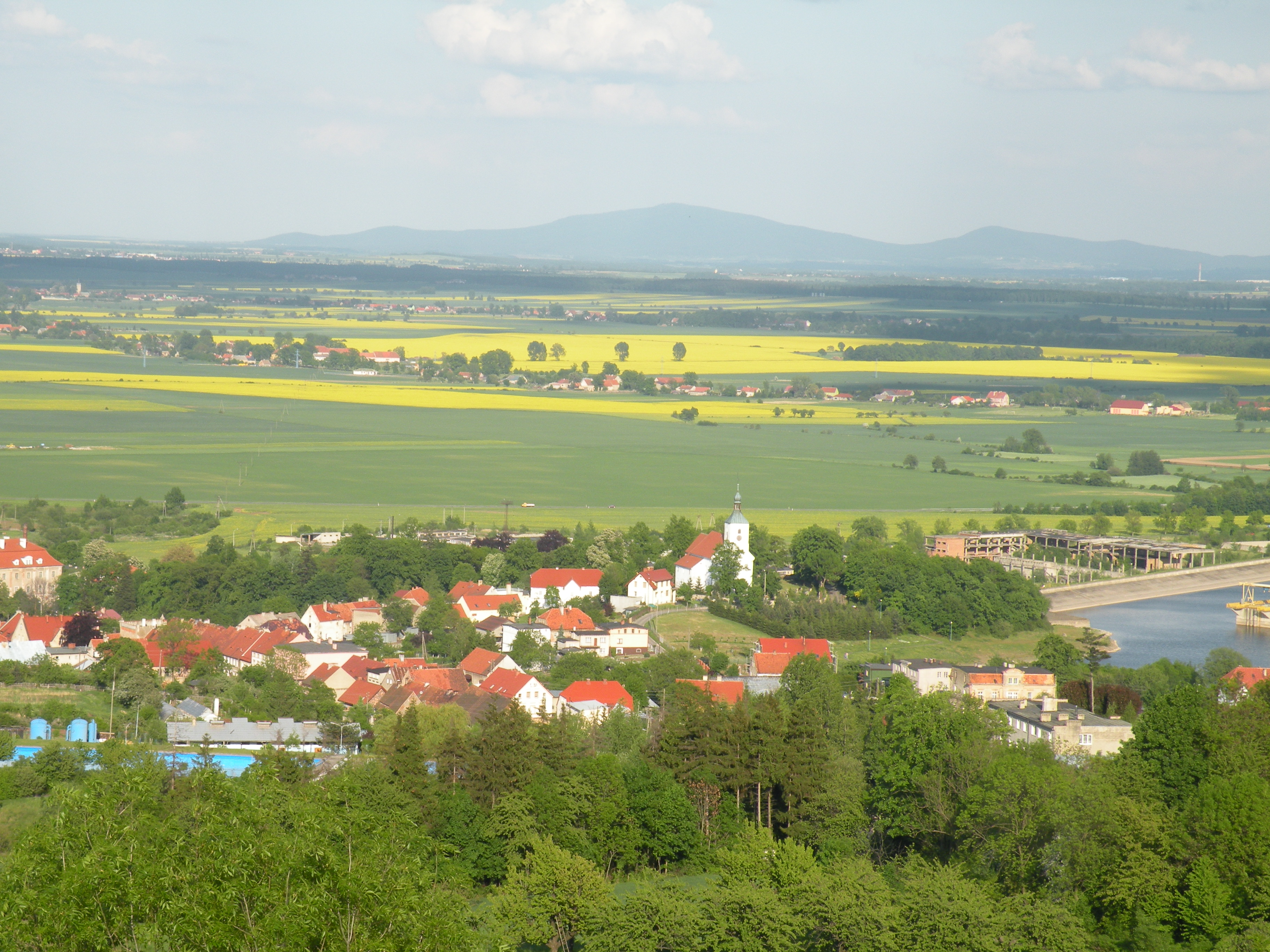 widok Dobromierza z wieży